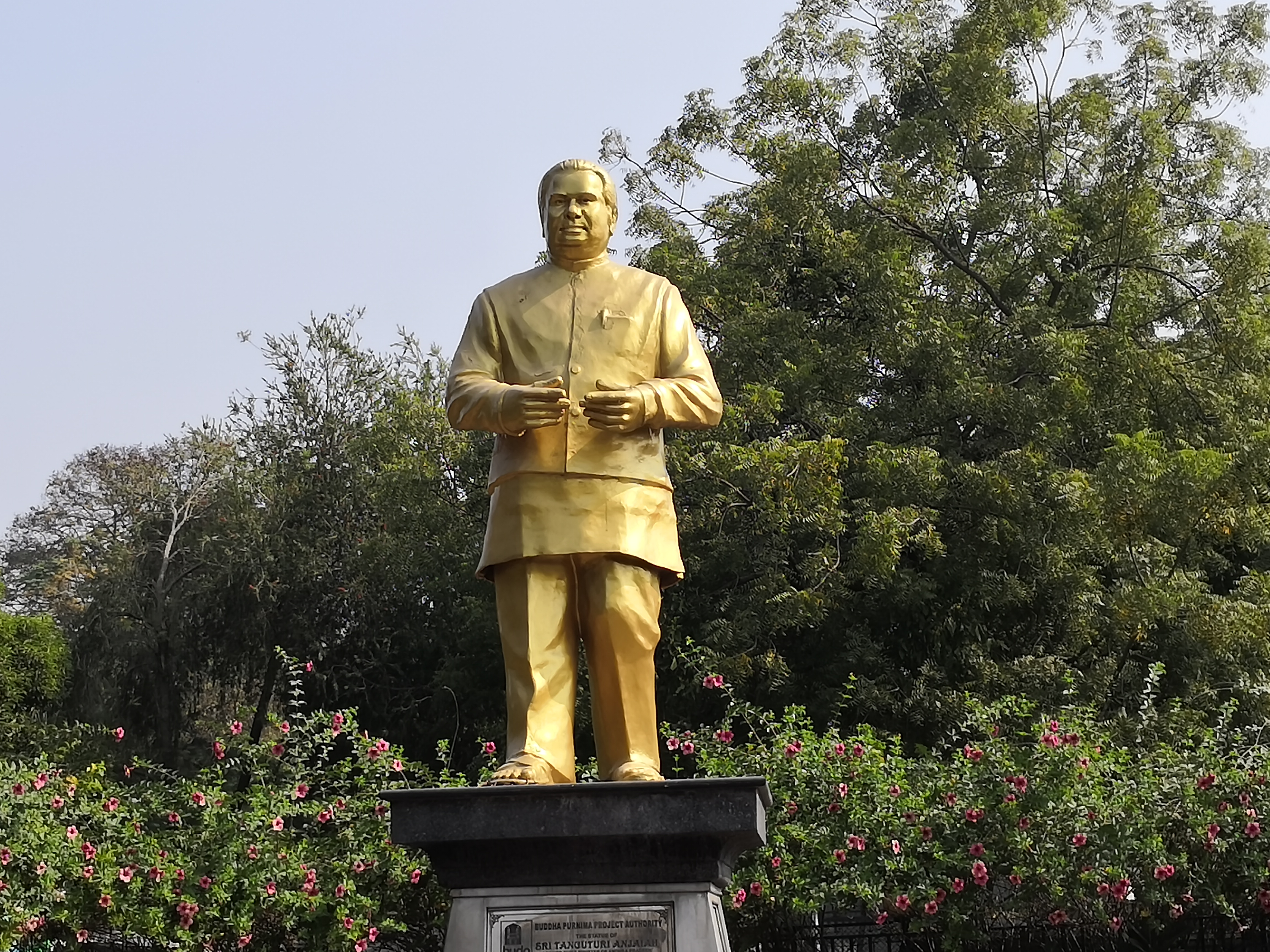 Tanguturi Anjayya statue near Hussain Sagar, Hyderabad